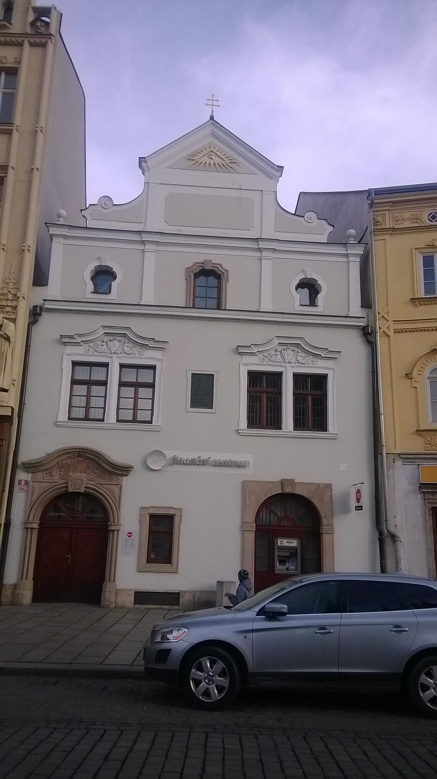 Dům Anny Kreslové